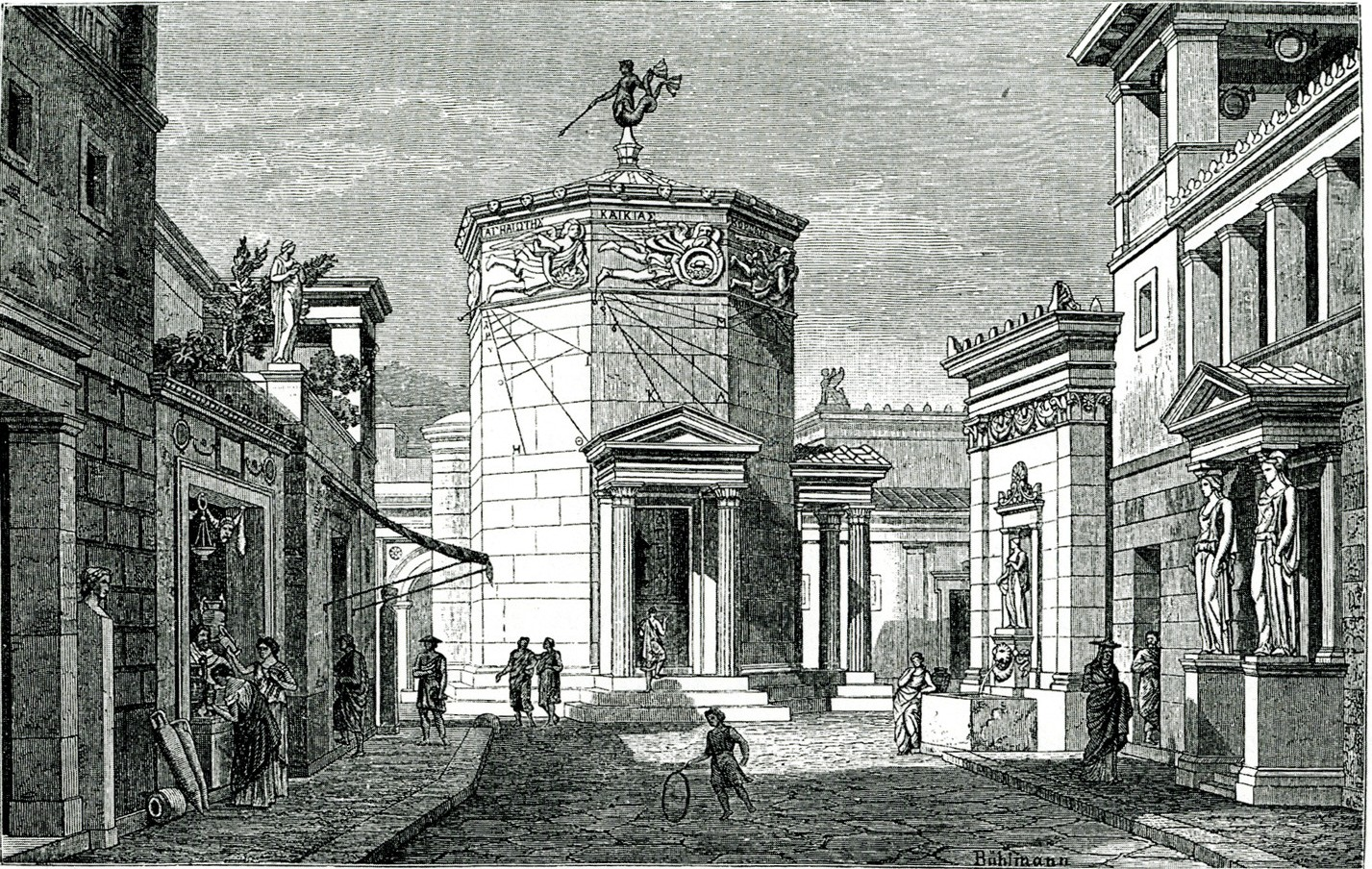 Ιάκωβος Φάλκε. Ελλάς, ο Βίος των Αρχαίων Ελλήνων. Κατά το γερμανικό του Ιακώβου Φάλκε, Ν. Γ. Πολίτης (μετ.), Αθήνα, Κάρολος Βίλμπεργκ, 1887